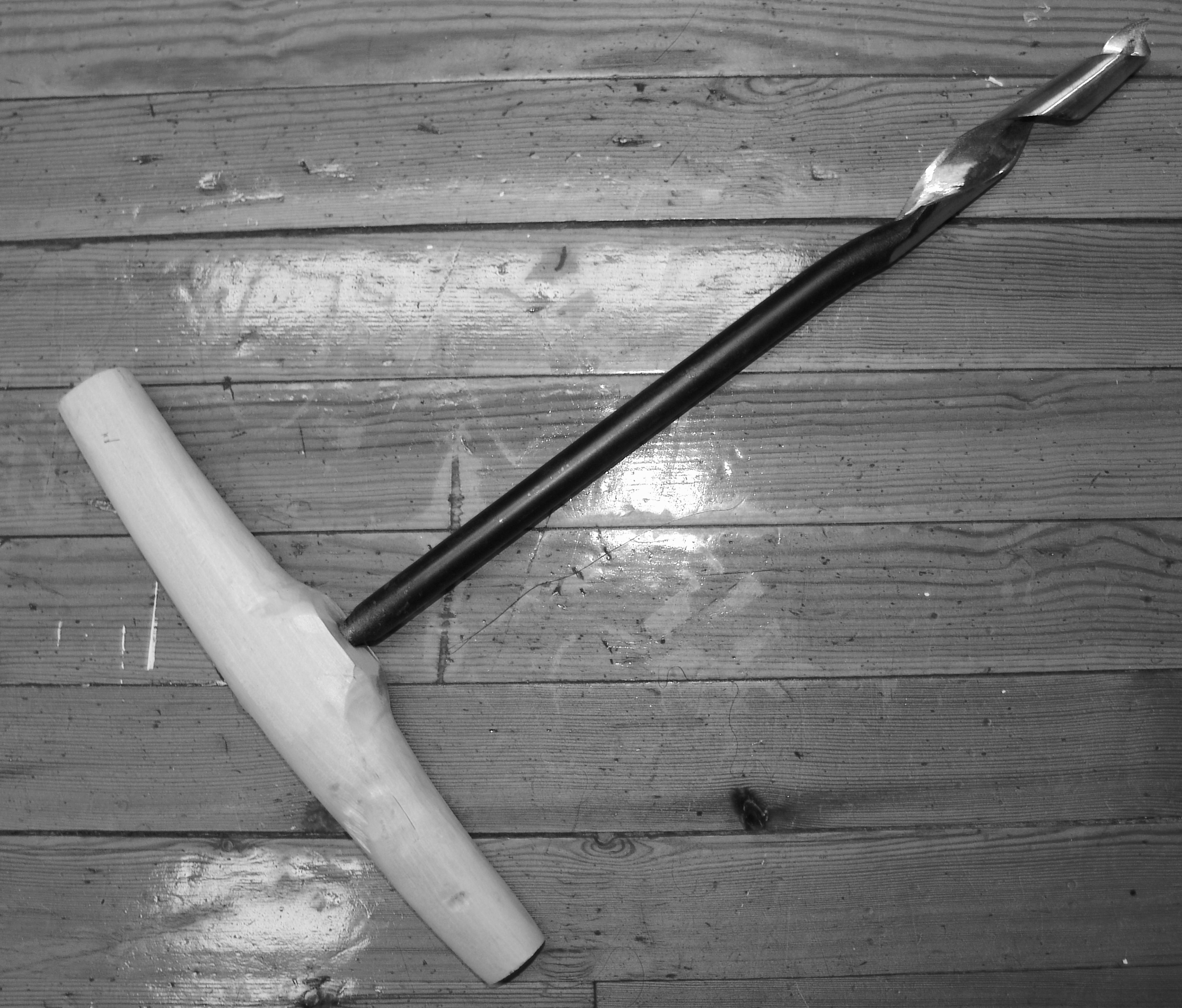 Navar, 1 toms størrelse, håndsmidd.